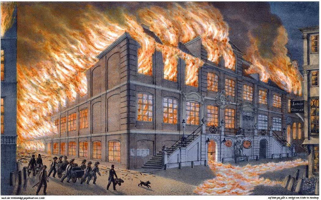 Das Eimbecksche Haus in Hamburg mit dem ehemaligen Ratskeller während des Großen Brandes in der Nacht vom 6ten zum 7ten Mai 1842. Gemalt von Peter Suhr.